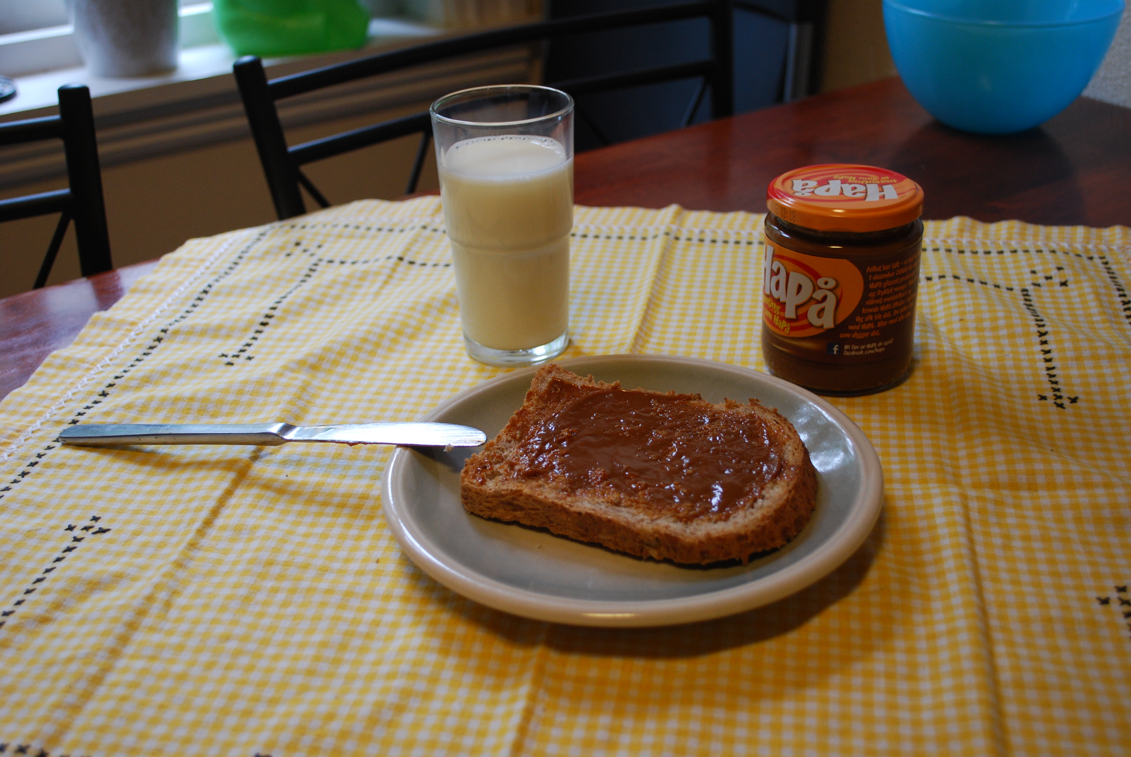 Brødskive med Hamar Pålegg (HaPå) og et glass melk.